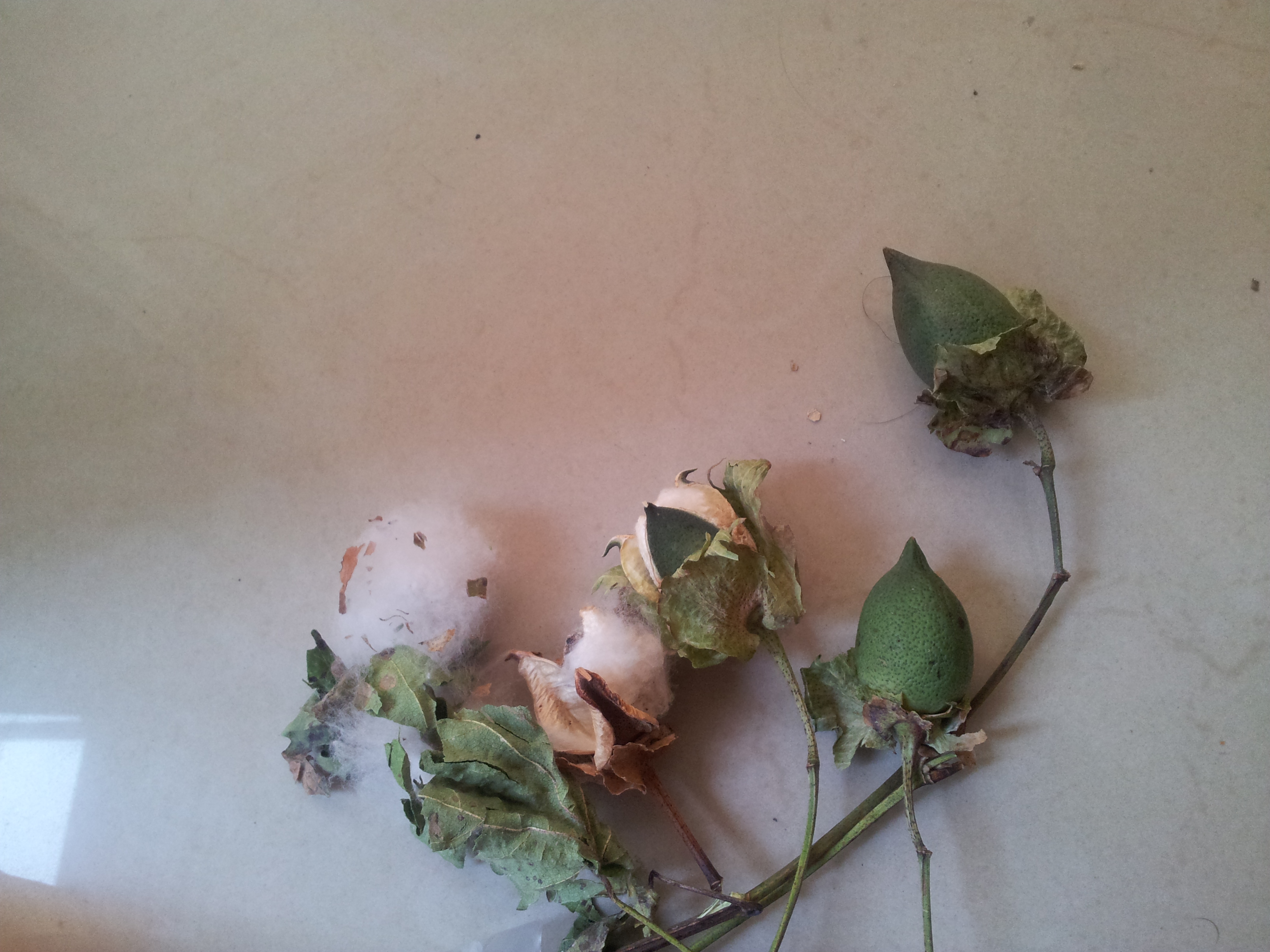 פירות כותנה בשלושה שלבי הבשלה